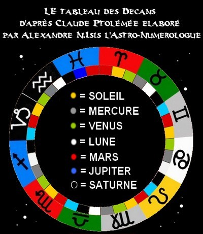 Les 36 decans de Claude Ptolémée.